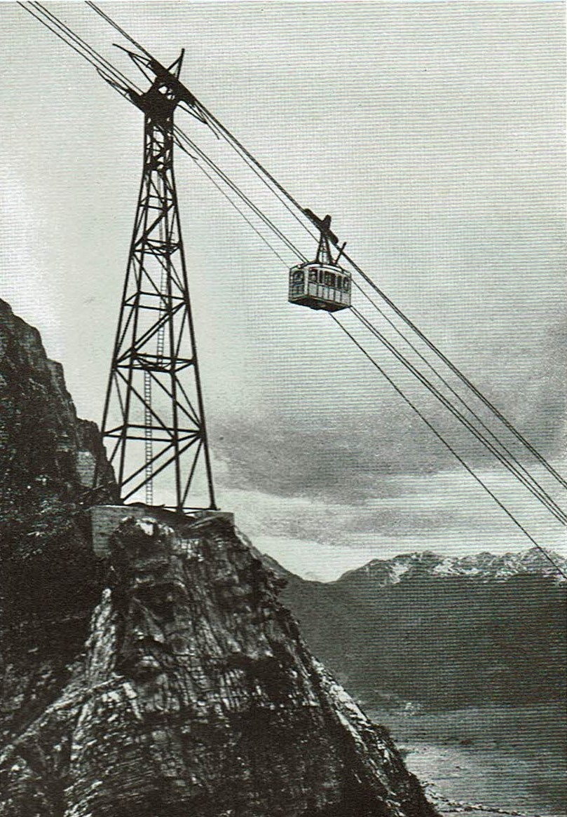 Erste Tiroler Zugspitzbahn Ehrwald-Obermoos (Oesterreich) 1926-1991